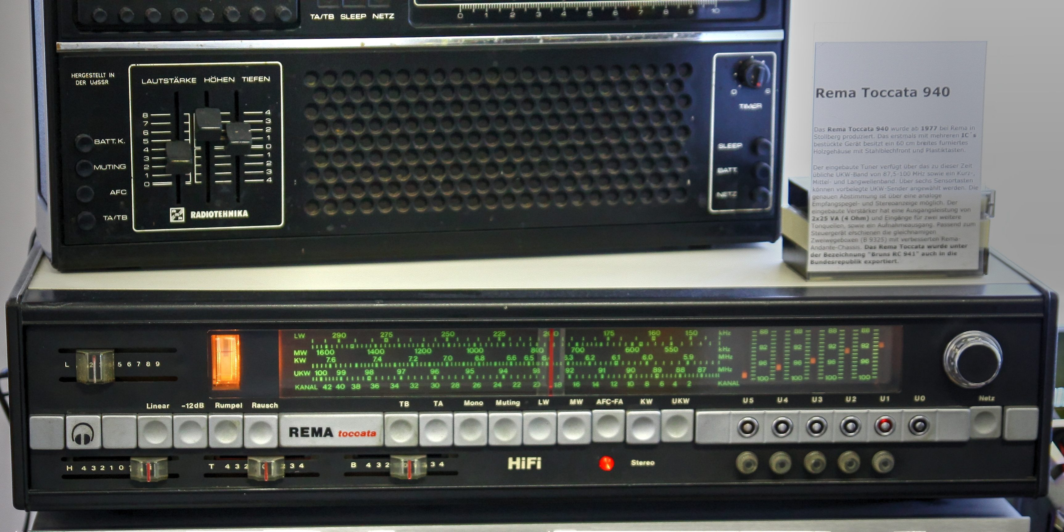 DDR-Museum Zeitreise in Radebeul 2012 - Hifi-Anlage "Rema Toccata 940" (ohne die beiden Zweiwege-Boxen B9325) von Rema Stollberg - wurde ab 1977 bis ca. 1982 hergestellt, Ausgangsleistung 2 x 25 VA (an 4 Ohm), Abmessungen (Steuergerät) B x H x T: 600 x 125 x 300 mm - Besonderheiten: sechs integrierte Schaltkreise, fünf UKW-Senderspeicher mit Sensor-Elementen, AFC, Muting-Funktion, Rumpel- und Rauschfilter, Linearschaltung / Neupreis (mit Boxen): ca. 1.950 DDR-Mark - weitere Angaben siehe Schild auf dem Gerät